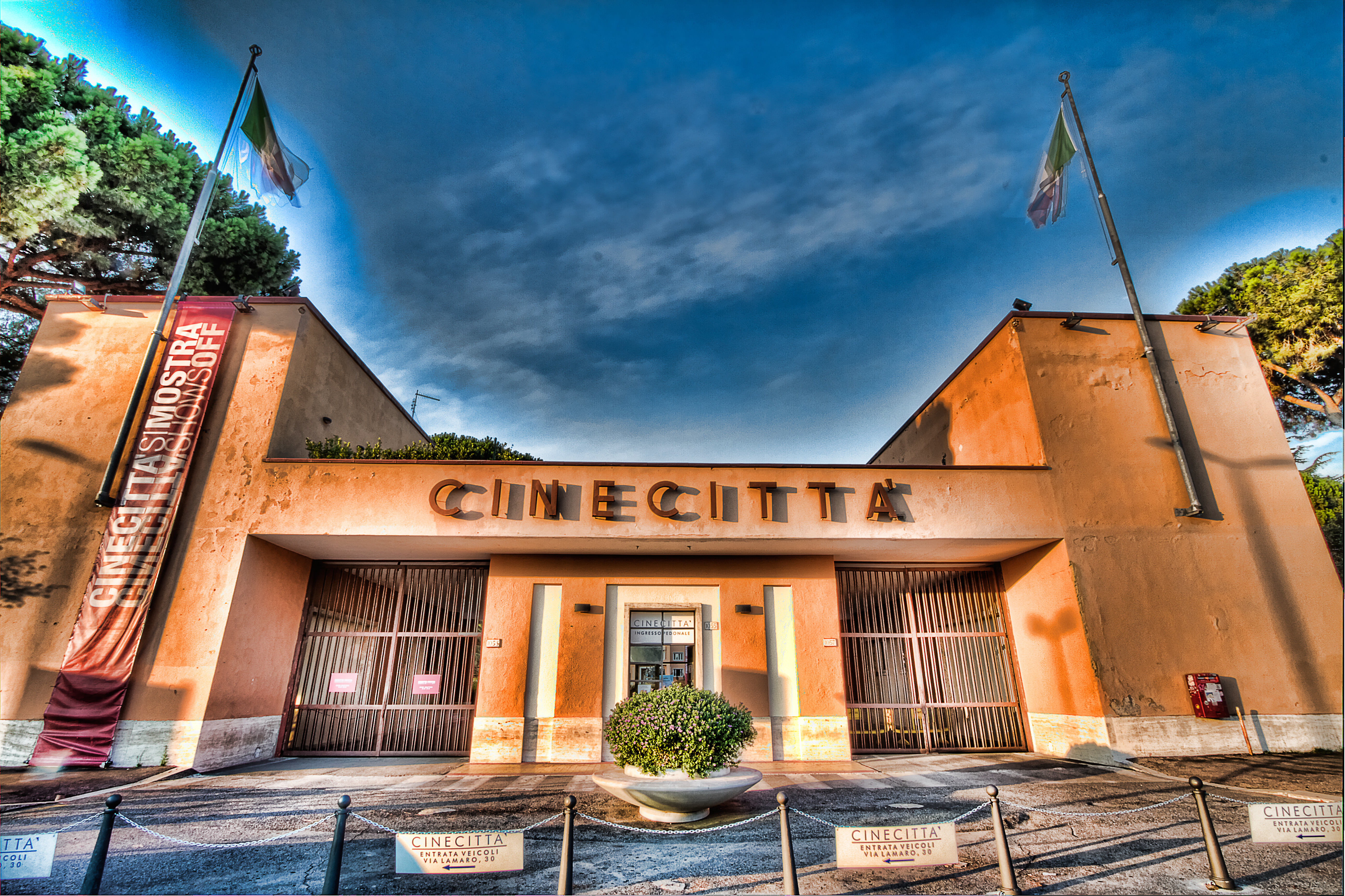 Intorno agli studi di Cinecittaà a Roma.